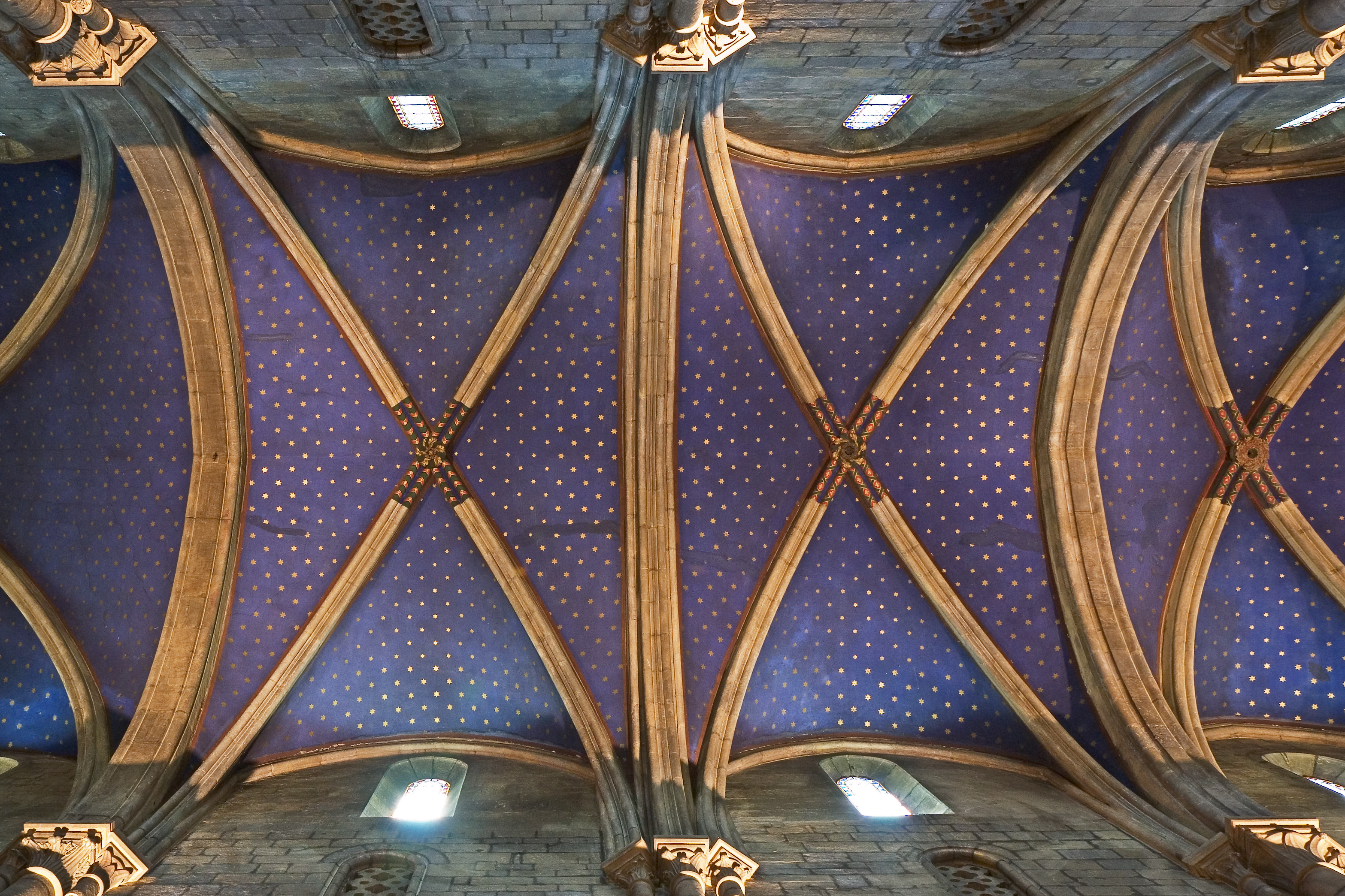 Gewölbe der Kollegiatskirche in Neuenburg